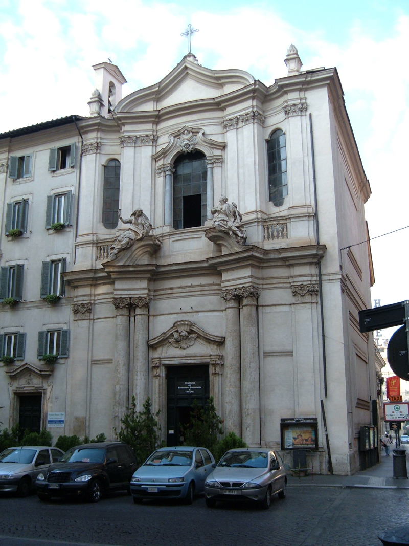 Oratorio del Santissimo Sacramento, a Roma, nel rione Trevi. Foto personale.